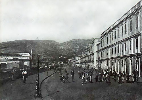 Reggio Calabria - antica Real Palazzina - vecchia cartolina - old postcard